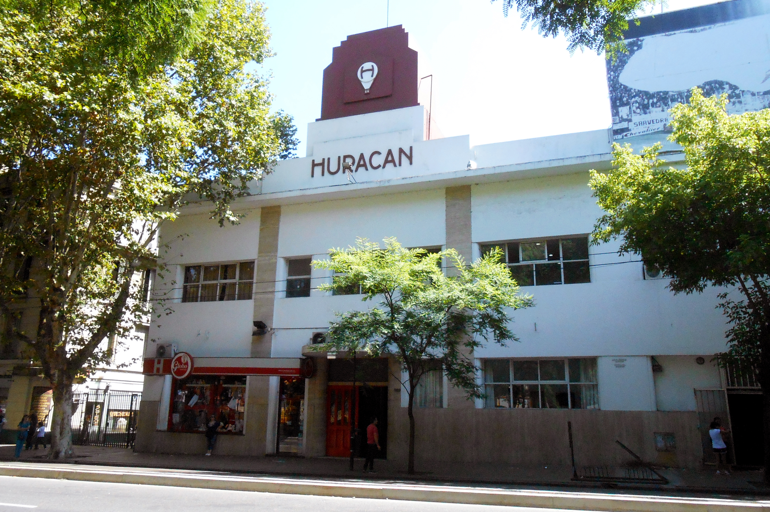 Sede C.A. Huracan en Parque Patricios, Buenos Aires, Argentina.